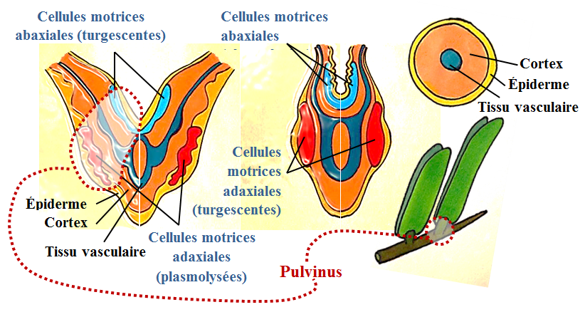 Pulvinus et ses composantes.